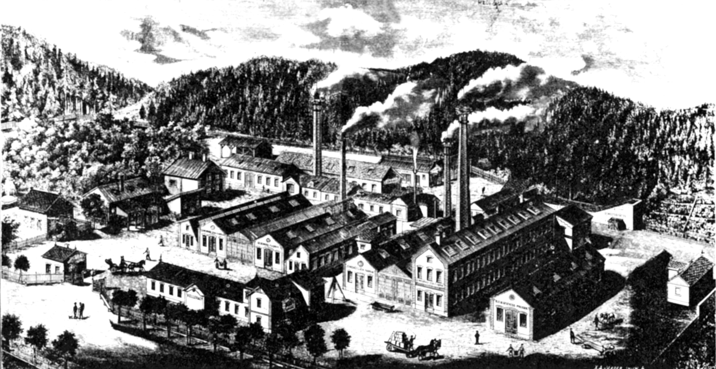 Patronenfabrik Hirtenberg.